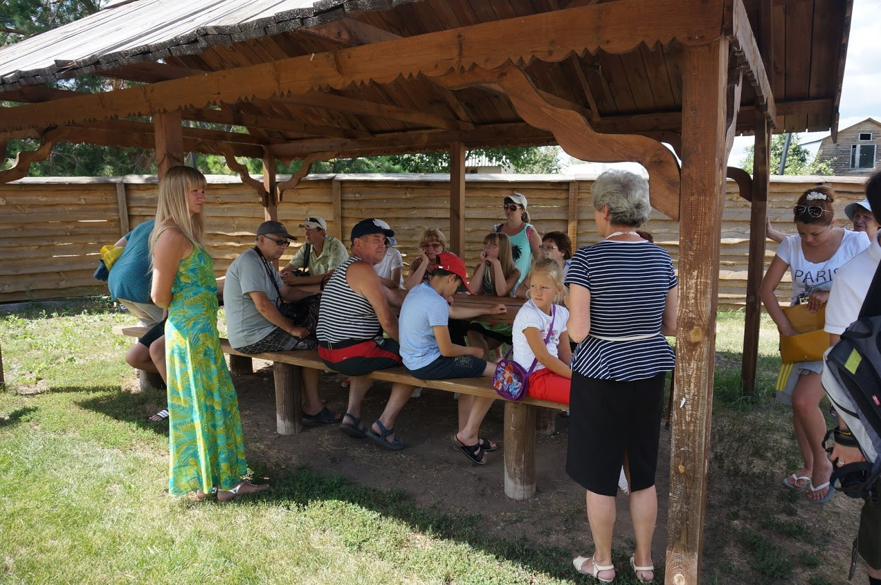 Экскурсия в музейном комплексе села Ширяево.